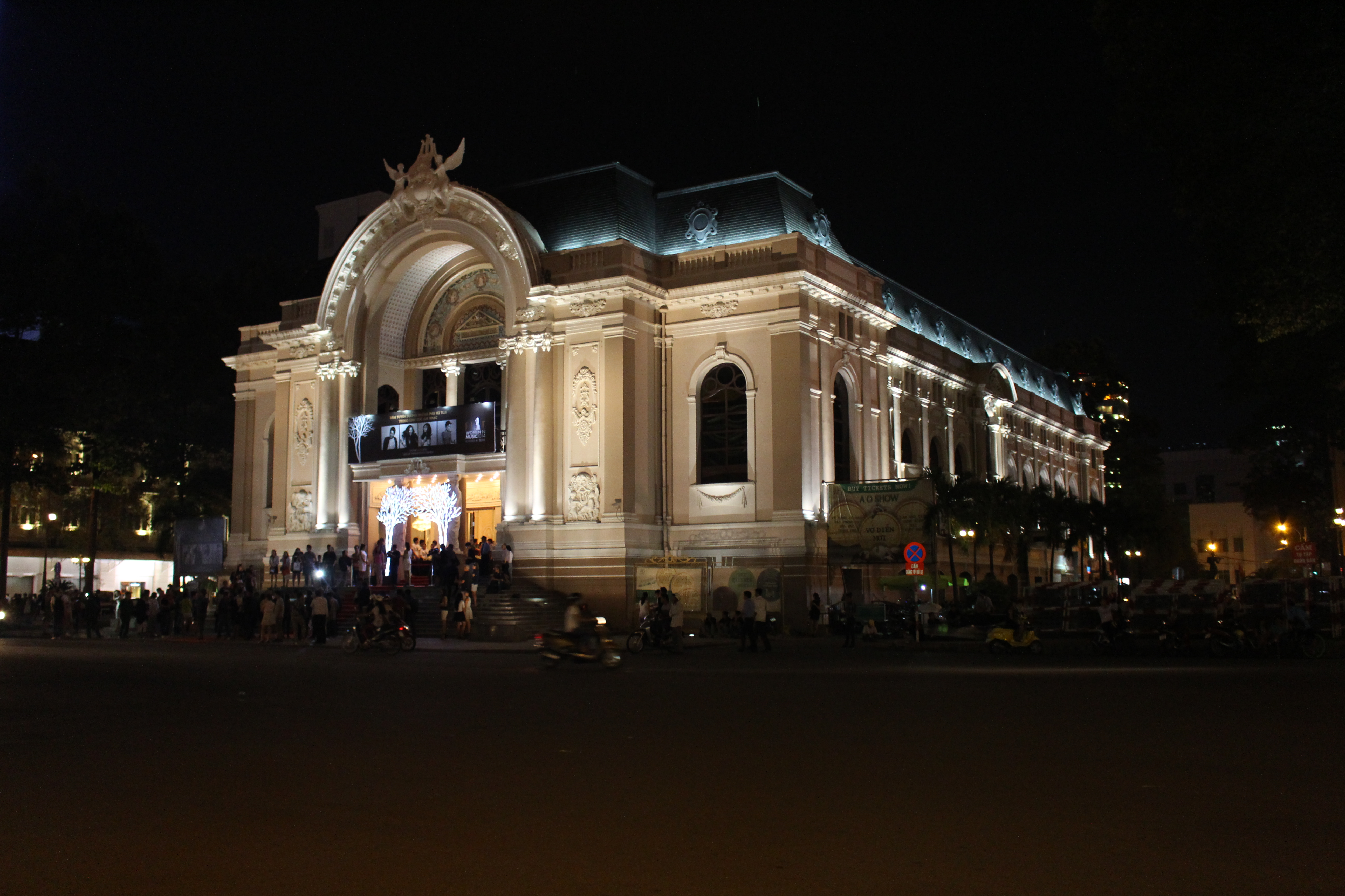 Il teatro